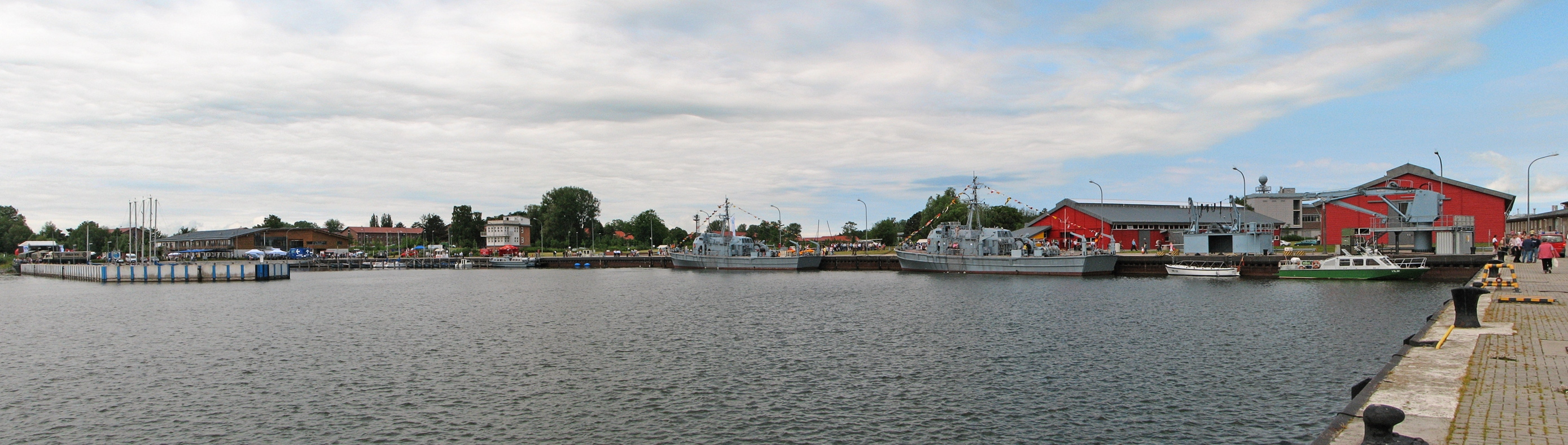 Dieses Bild zeigt den Hafen der Marinetechnikschule in Parow.